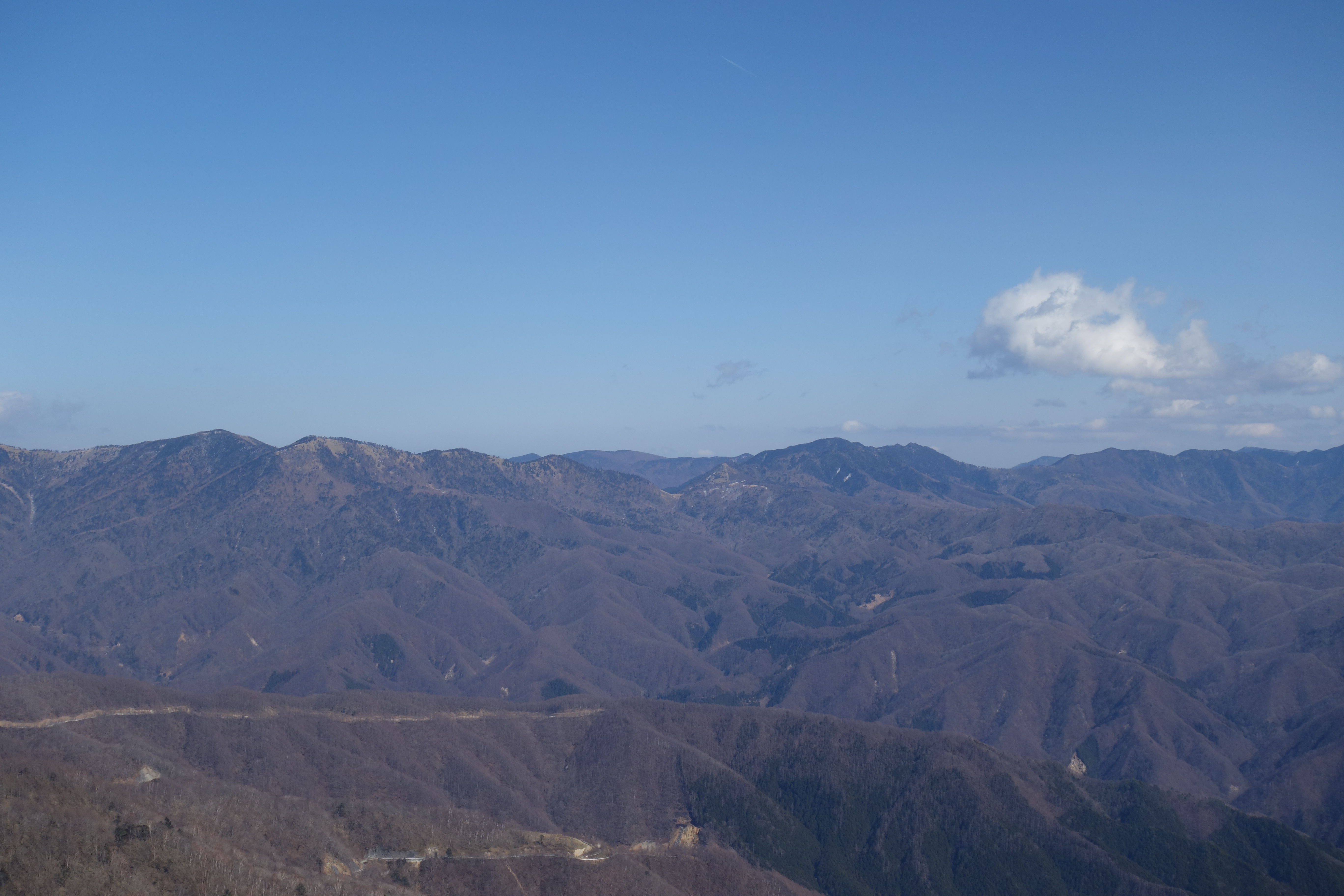 乾徳山から見た奥秩父山塊2